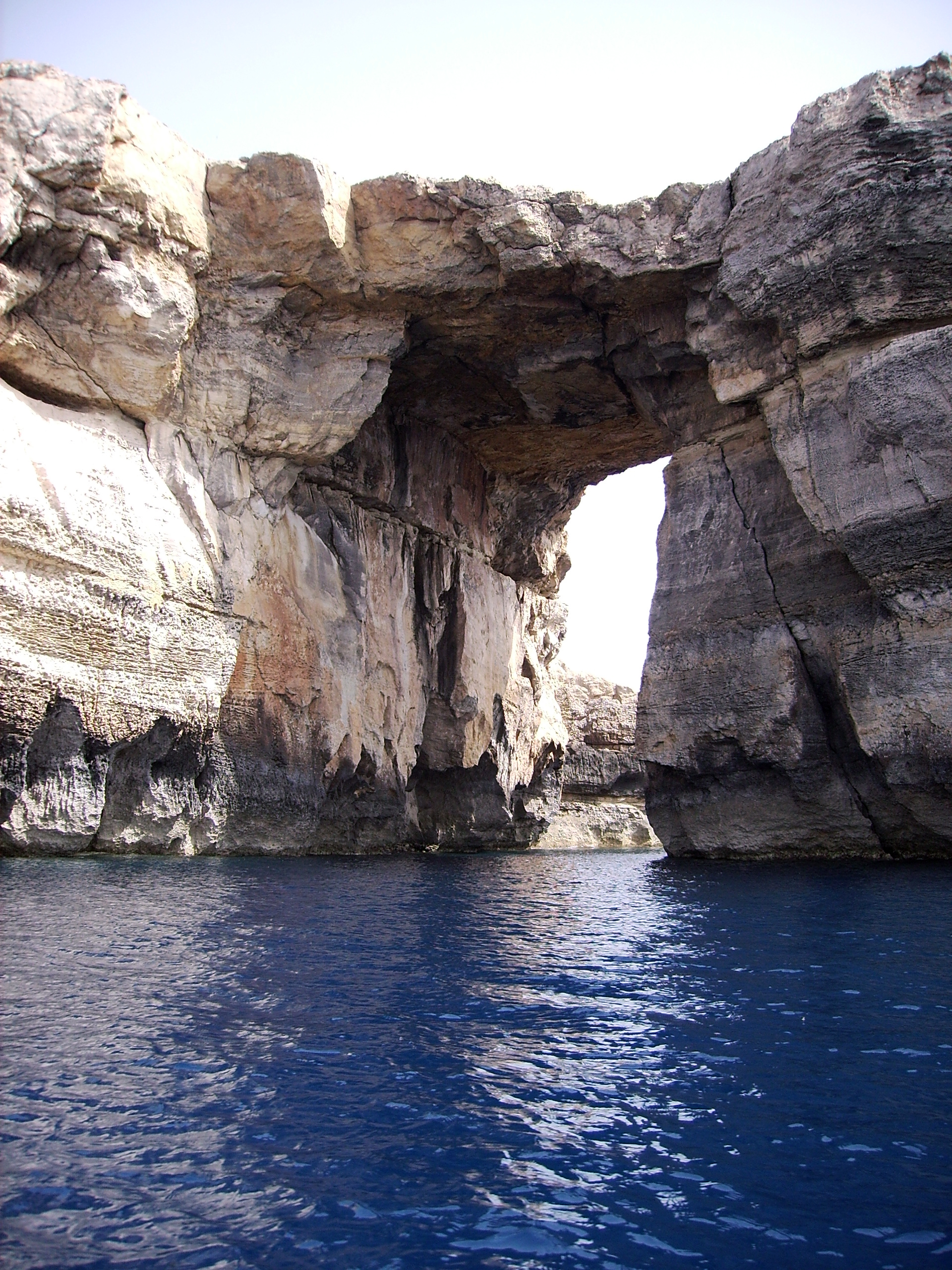 Azure Window Rückseite